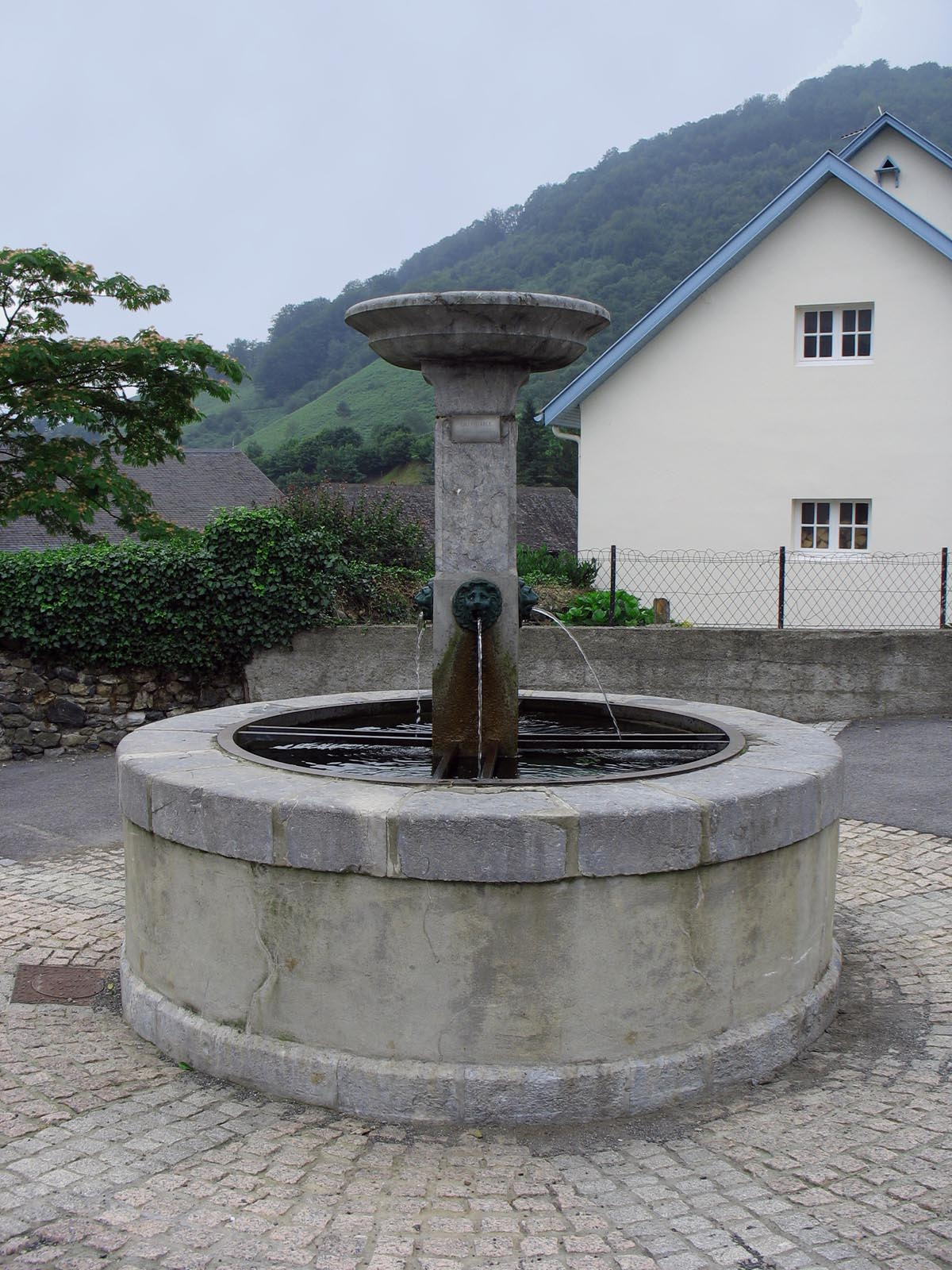 La fontaine du village de Larrau dans le département des Pyrénées-Atlantiques Auteur Monster1000 France juillet 2006